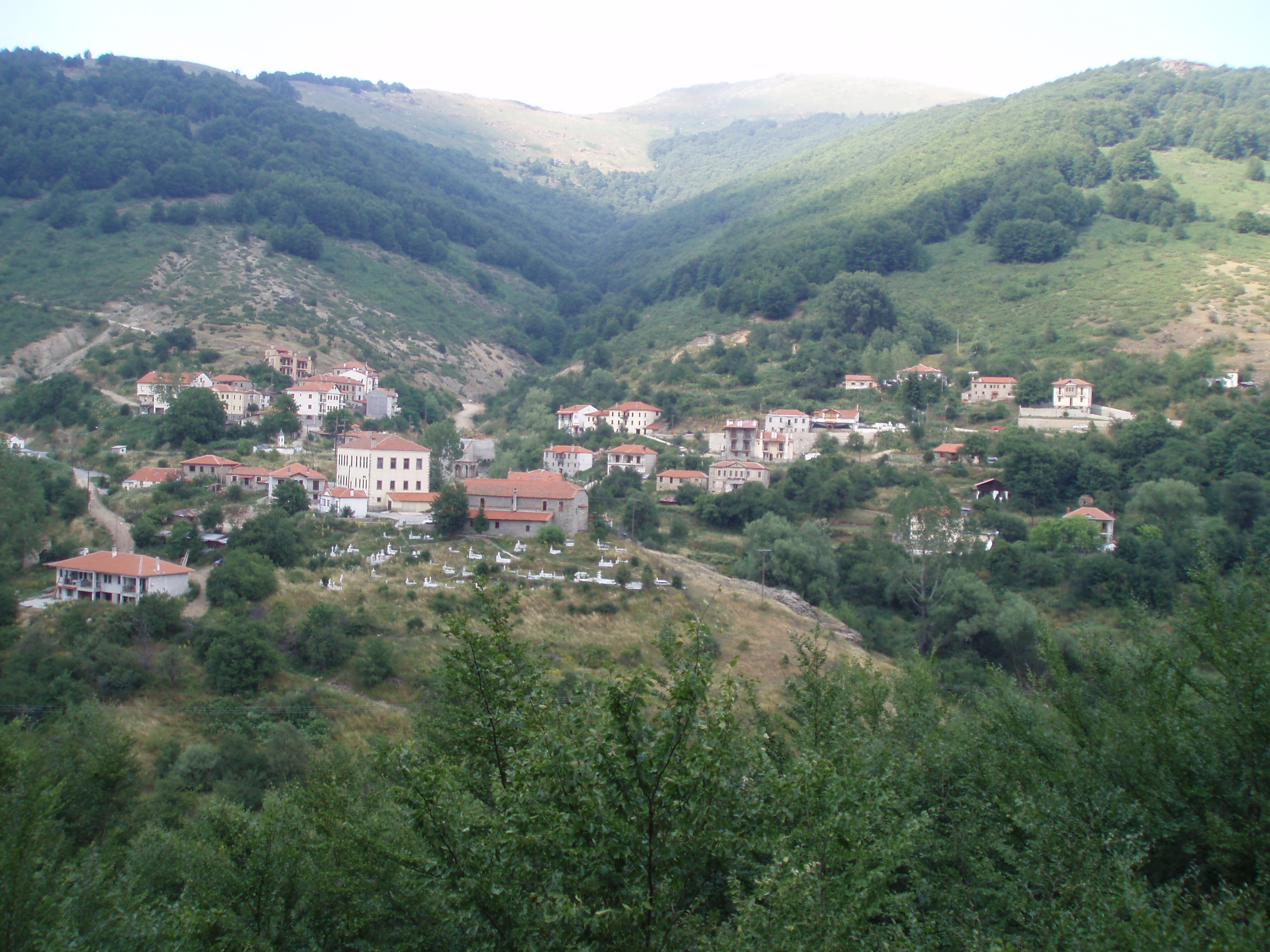 Το χωριό Πισοδέρι. Η φωτογραφία έχει τραβηχτεί από την τοποθεσια "πέτρα (βράχο) του φιλιού" (κιάτρα αλ μπας, στα βλάχικα). Ενας ορατός από το χωριό βράχος, όπου ανέβαιναν τα νιόπαντρα ζευγάρια για να δώσουν το πρώτο τους φιλί.